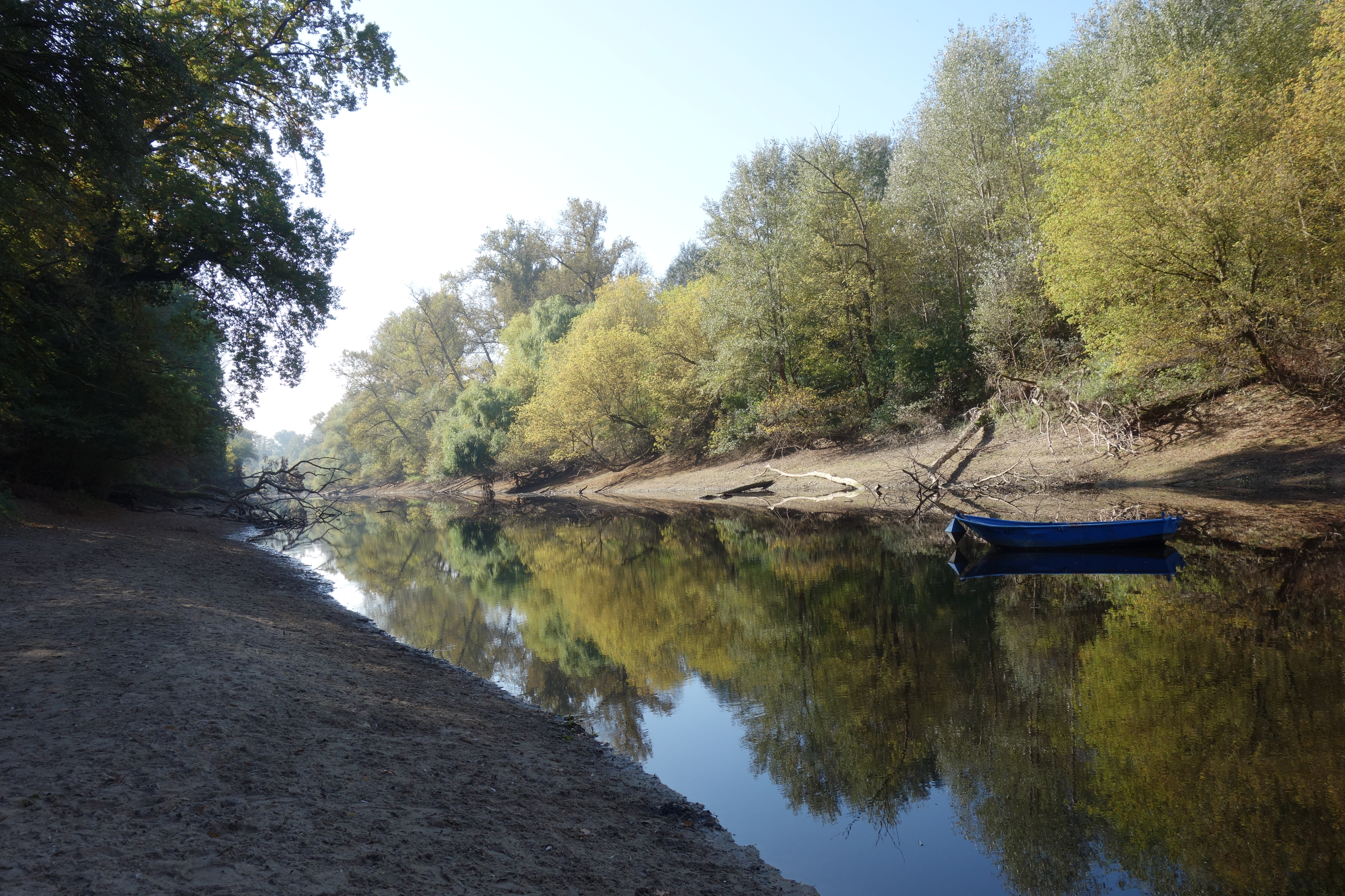 (NSG:BW-2.012)_Reißinsel, Deutschland, Baden-Württemberg, Mannheim, Rhein, Naturschutzgebiet Reissinsel vom Waldpark über den Altrheinarm "Bellenkrappen" gesehen